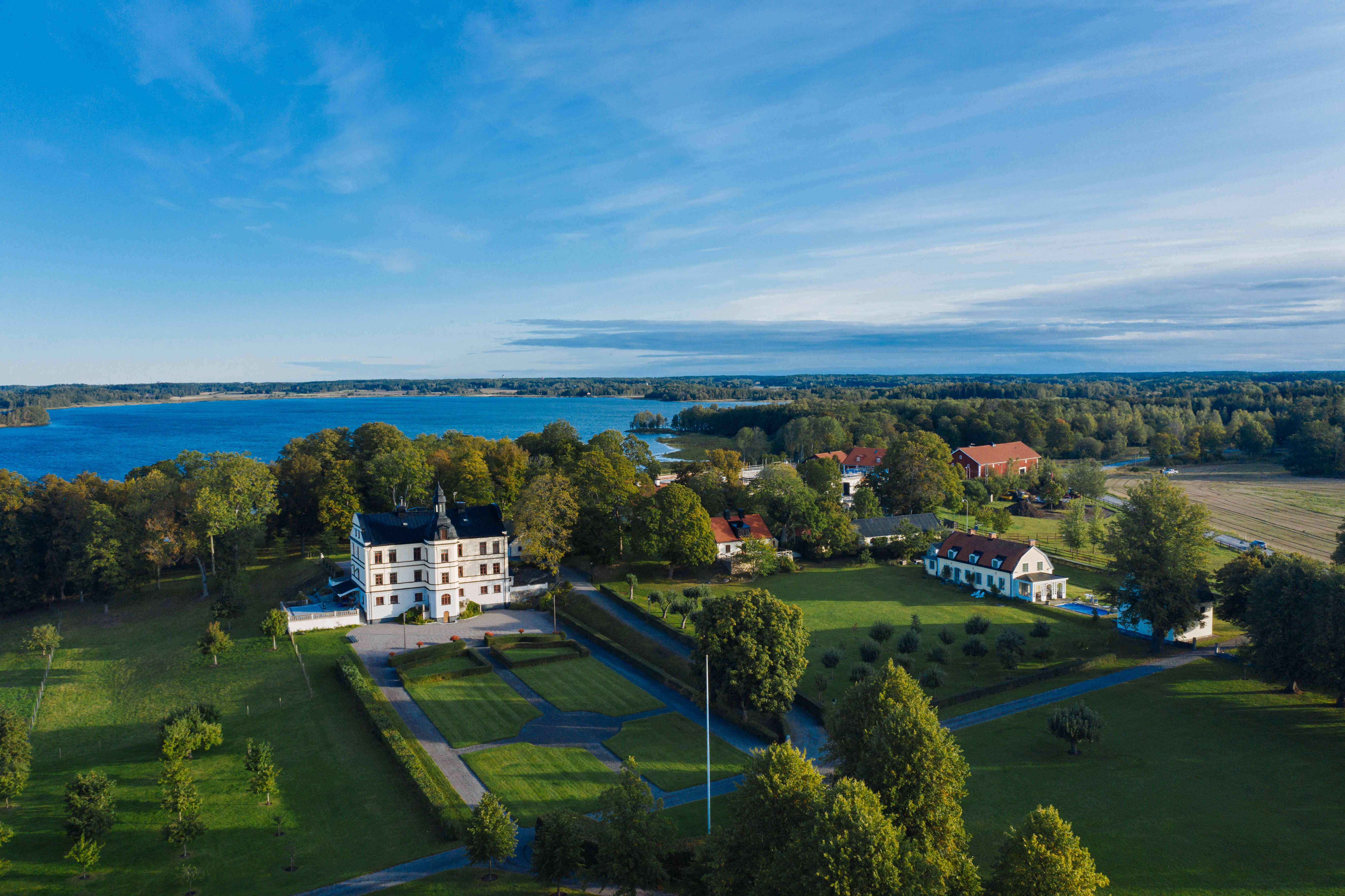 Luftvy av Torsåker Slott, Upplands Väsby, September 2019